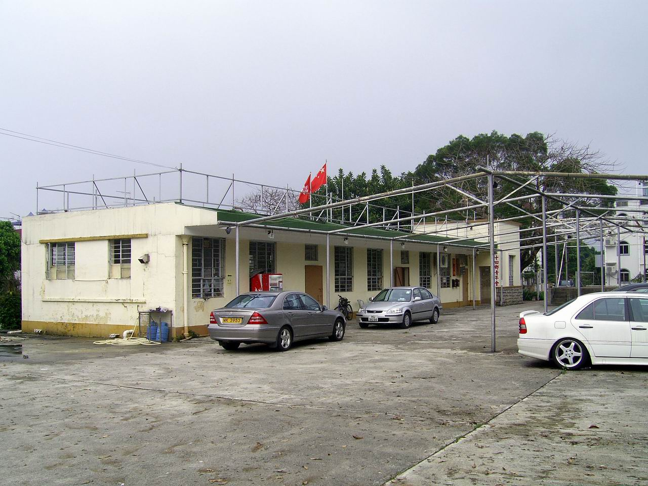 十四鄉鄉公所